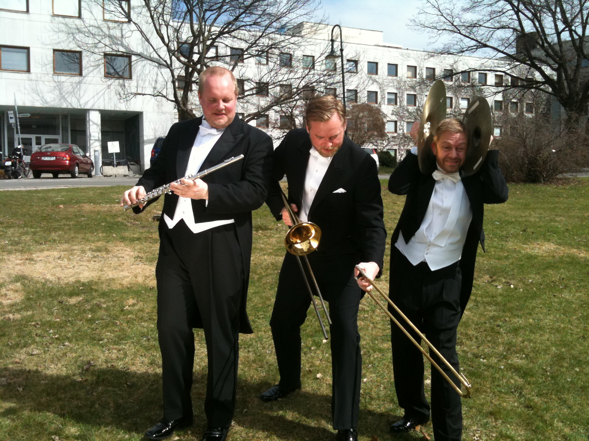 April 2010 før konserten med KORK og Radioresepsjonen